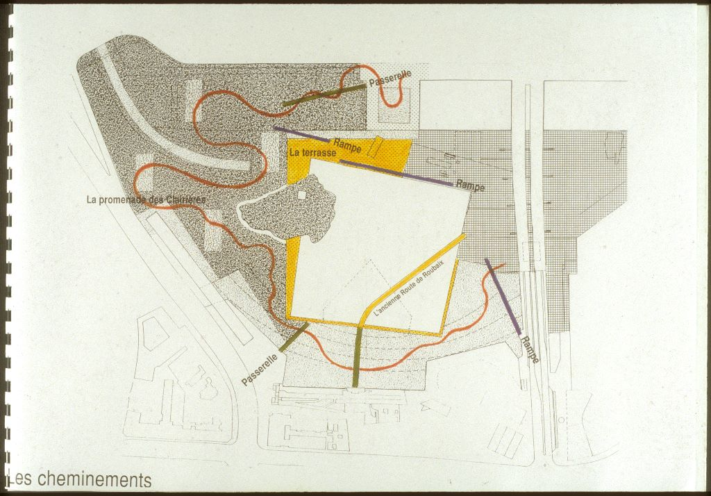 parc Matisse, Lille ,plan général